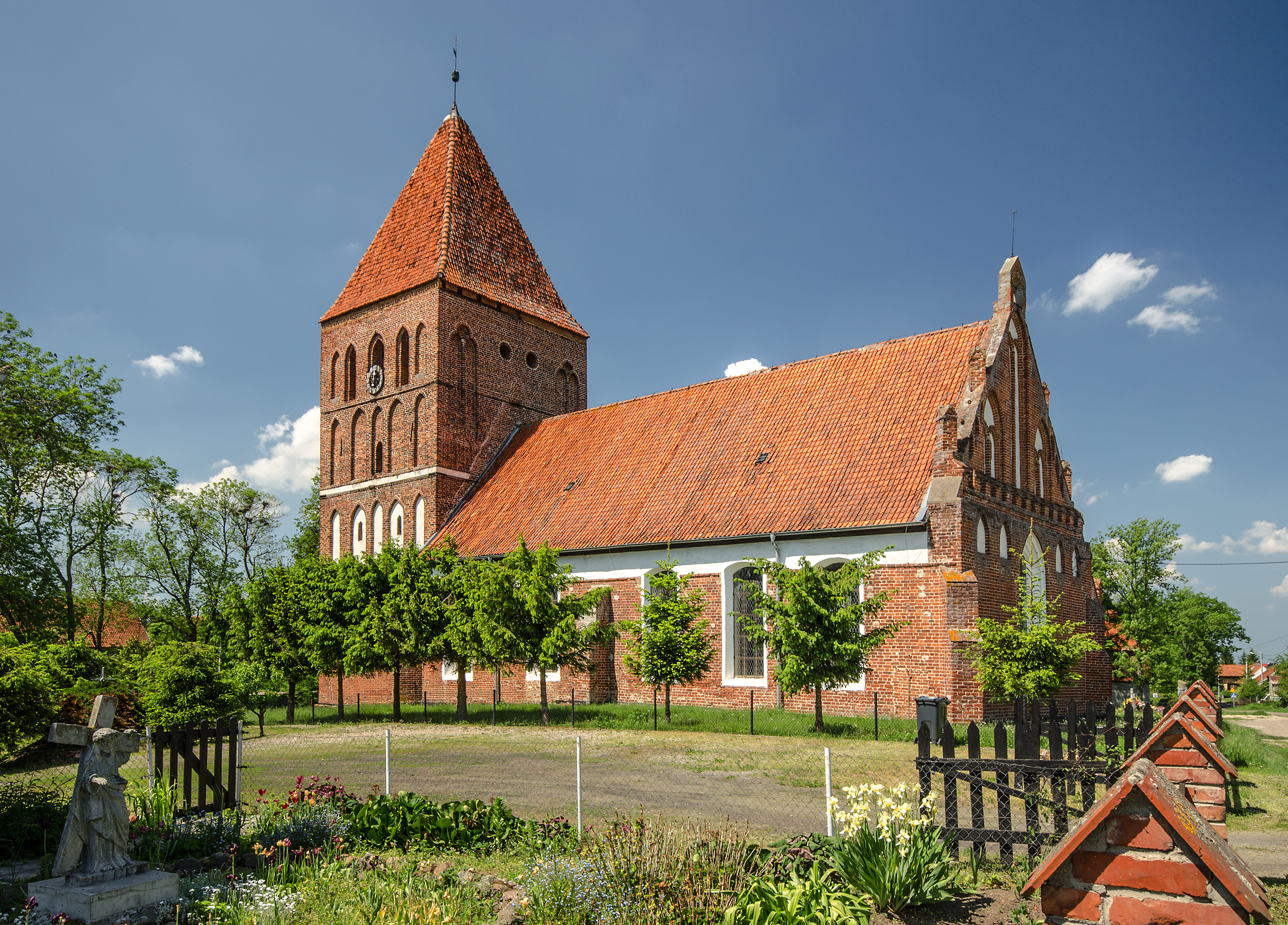 Jelonki - rzymskokatolicki kościół parafialny p.w. Najśw. Serca Pana Jezusa, 2 ćw. XIV, poł. XIX